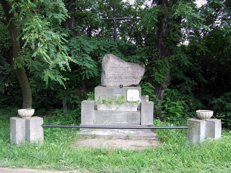 Reduta nr 54 Ordona, Warsaw